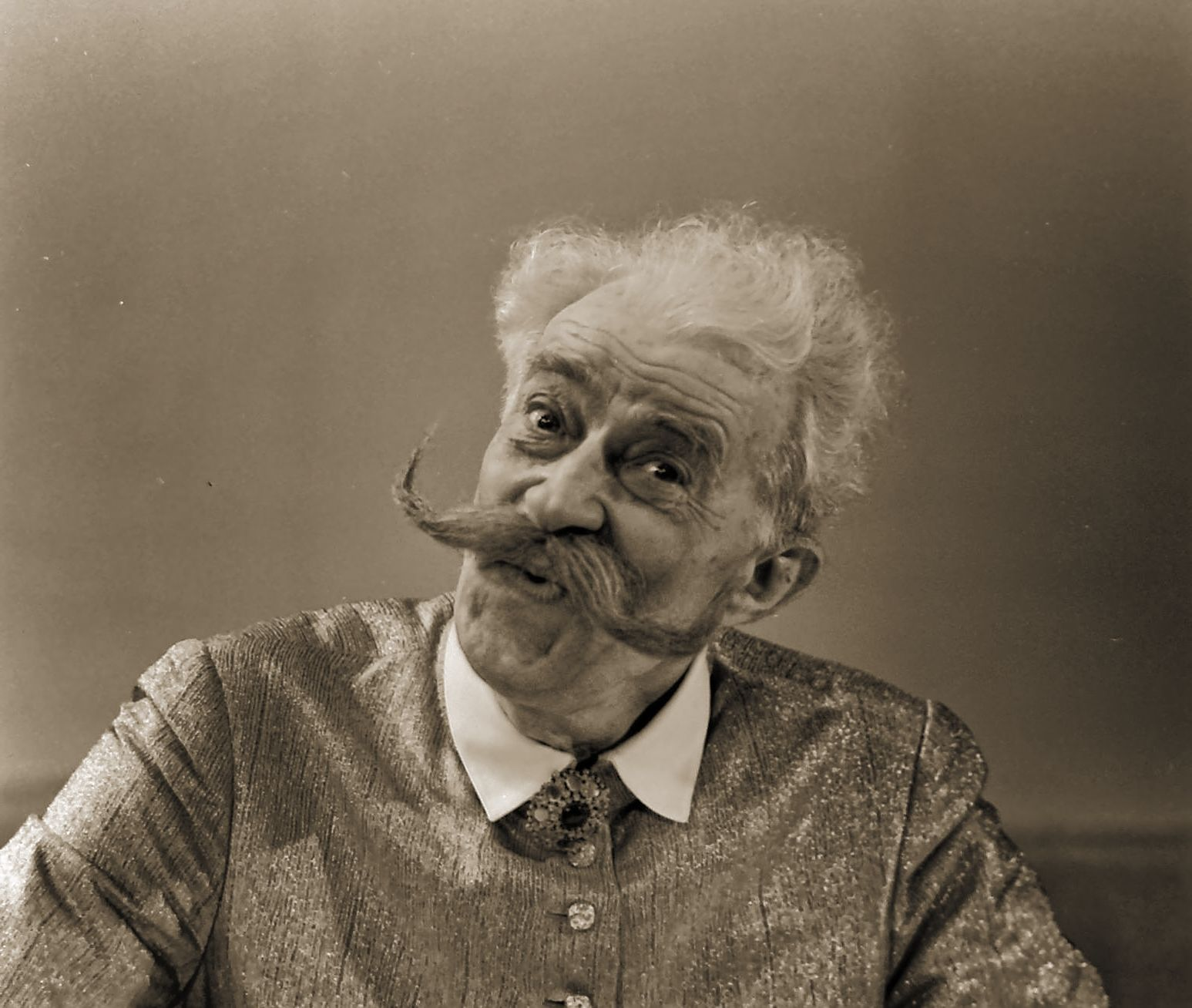 Aktor i reżyser Jan Świderski, grający rolę Cześnika w "Zemście" w Teatrze im. Juliusza Osterwy w Lublinie, w 1984 roku. Skan (reprodukcja) negatywu analogowego formatu 6x9 cm, autorstwa Zbigniewa Zugaja. Zdjęcie było publikowane w prasie lubelskiej tamtych lat przy okazji premiery przedstawienia.